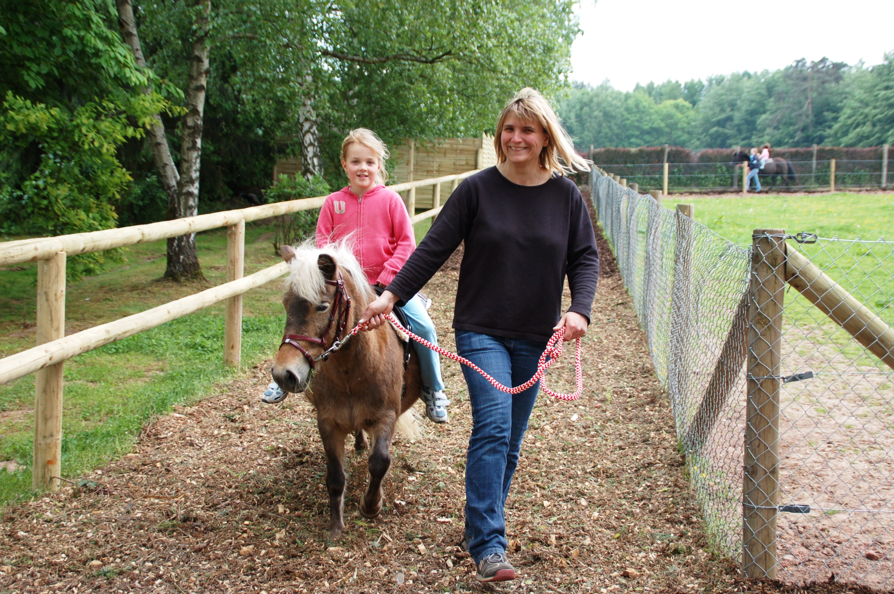 Ponyreiten